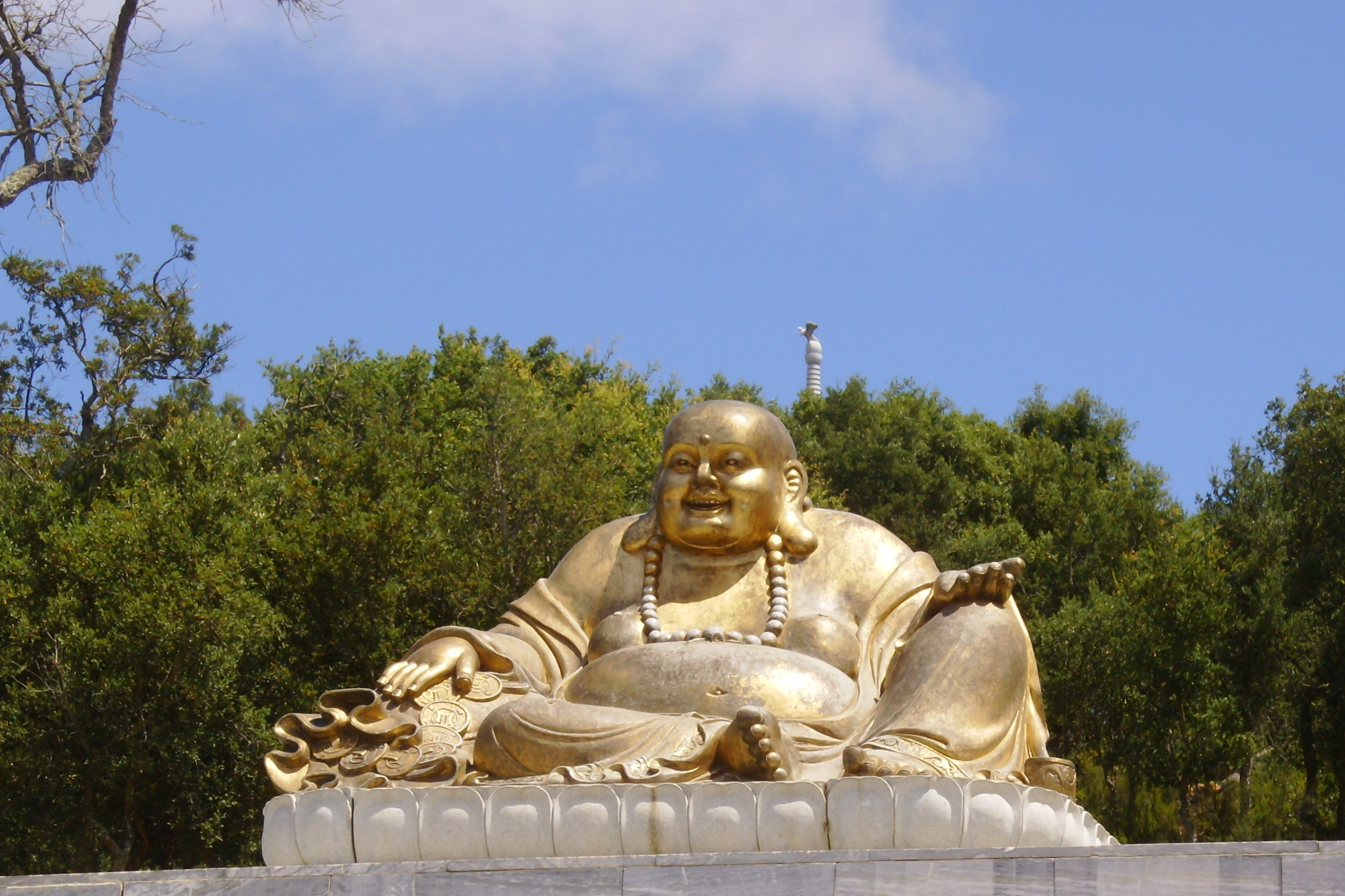 Quinta dos Loridos, freguesia do Carvalhal, concelho do Bombarral, distrito de Leiria, Portugal: Buddha Eden.